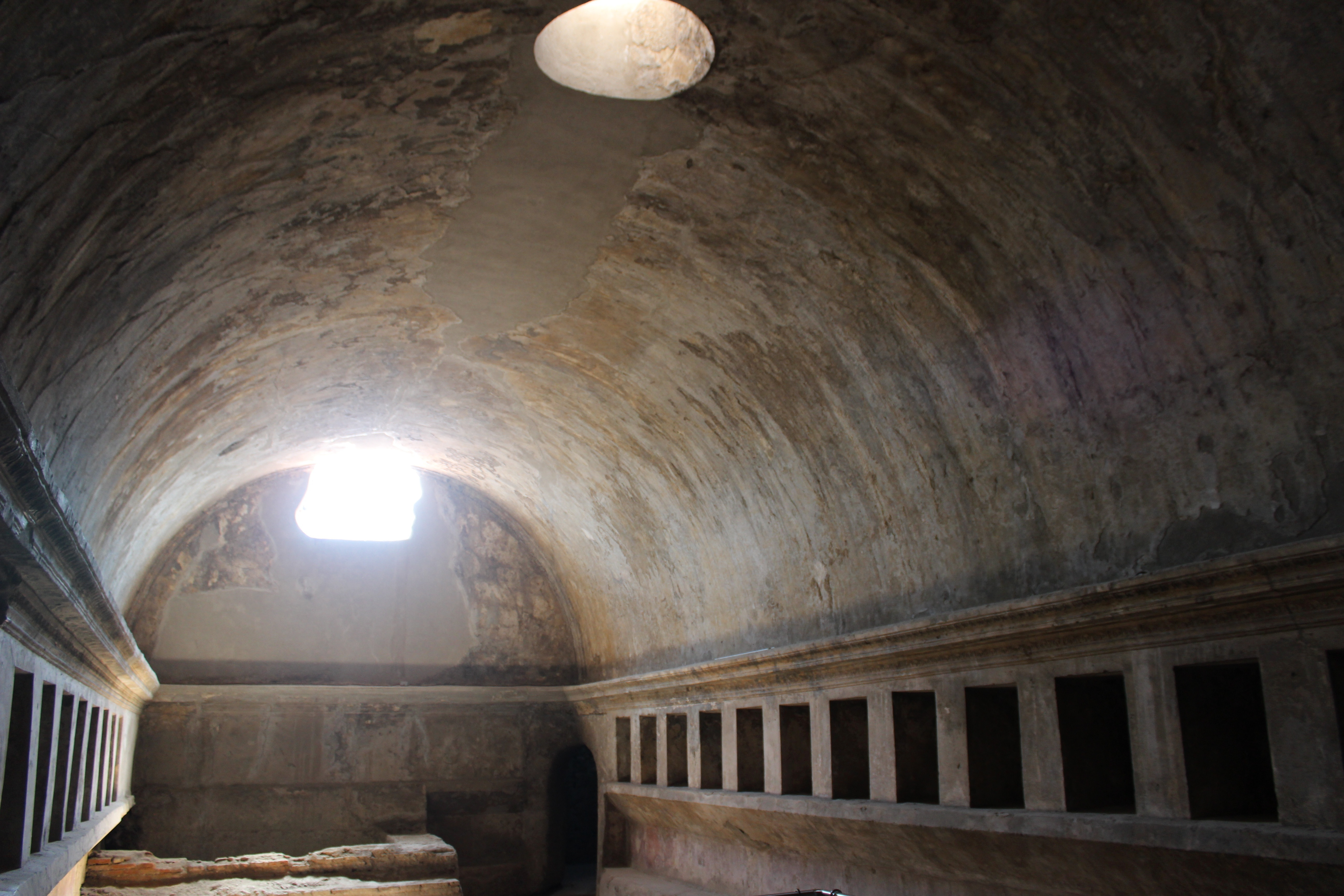 Apodyterium. Terme Stabiane.